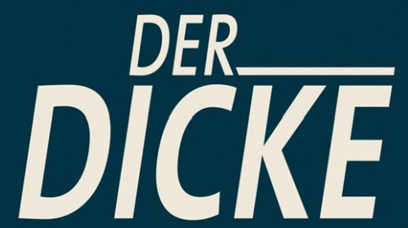 Logo von Der Dicke